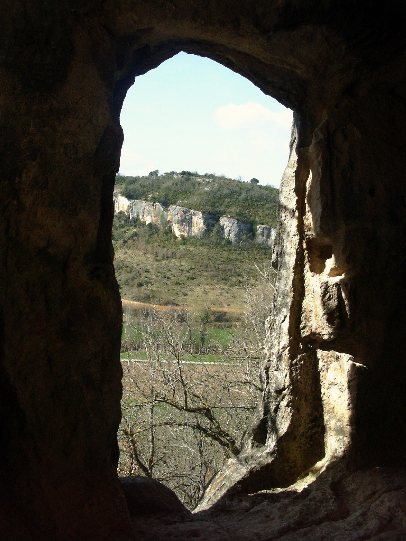 Lañuko Las Gobas kobazuloak Santorkariako kobazuloetako batetik ikusiak.